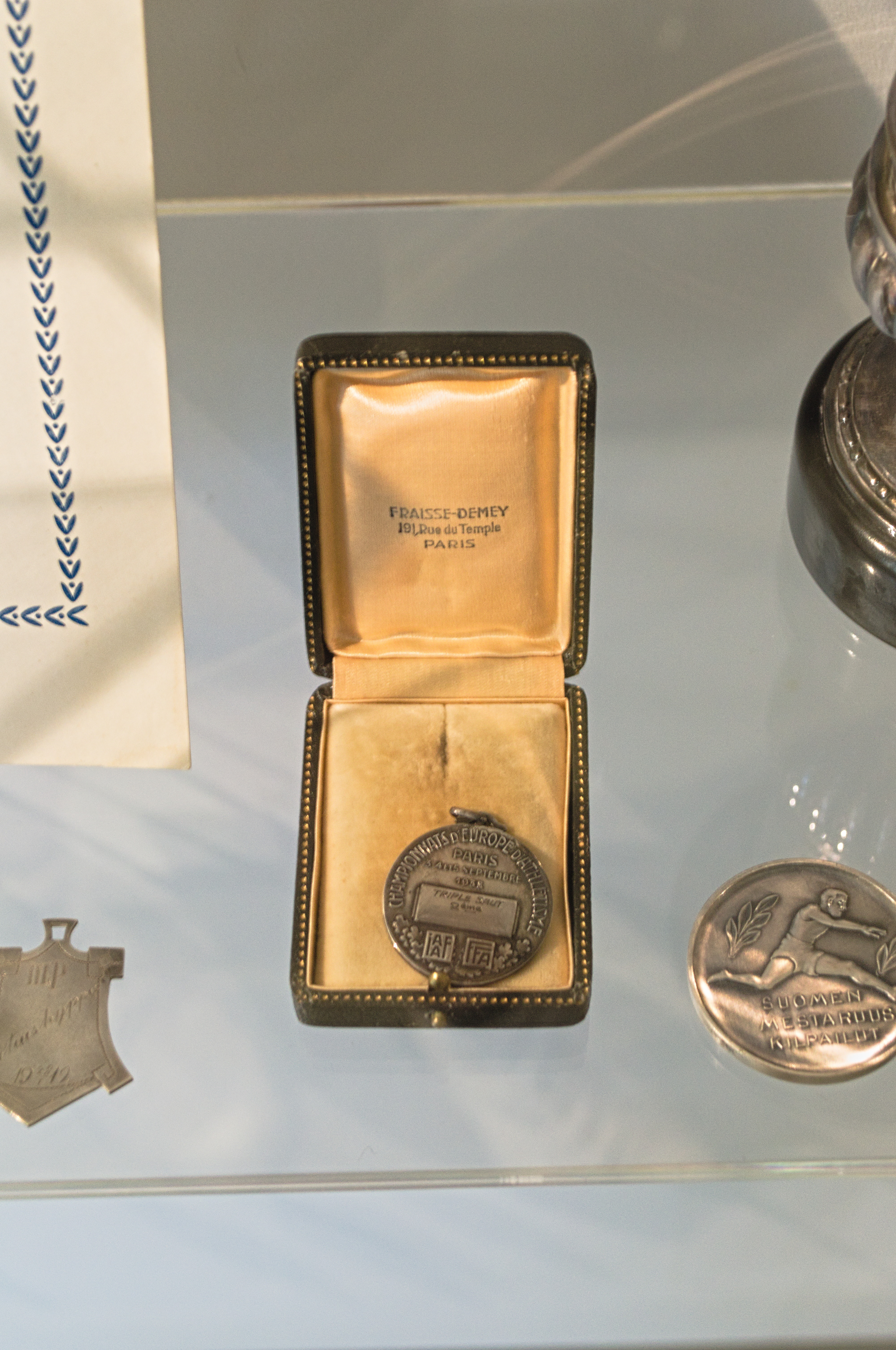 Kolmiloikkaana Jouko Norénin hopeamitali yleisurheilun EM-kilpailuista 1938.